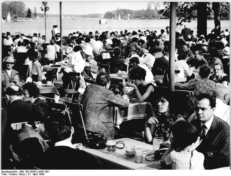 Berlin, Gesellschaftshaus "Grünau" Zentralbild Franke ba 21.4.68 Berlin: Das Gesellchaftshaus Grünau machte am heutigen Sonntag (21.4.68) seinem Namen alle Ehre. Eine so große Gesellschaft hat sich hier im April - und dann noch im Freien - schon lange nicht mehr zusammengefunden, um eine kühle Brise oder ein kühles Blondes zu genießen.